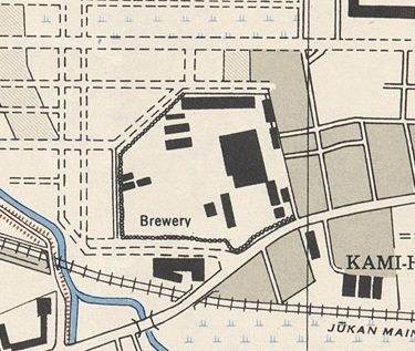 美軍地圖上的高砂麥酒株式會社（建國啤酒獎）